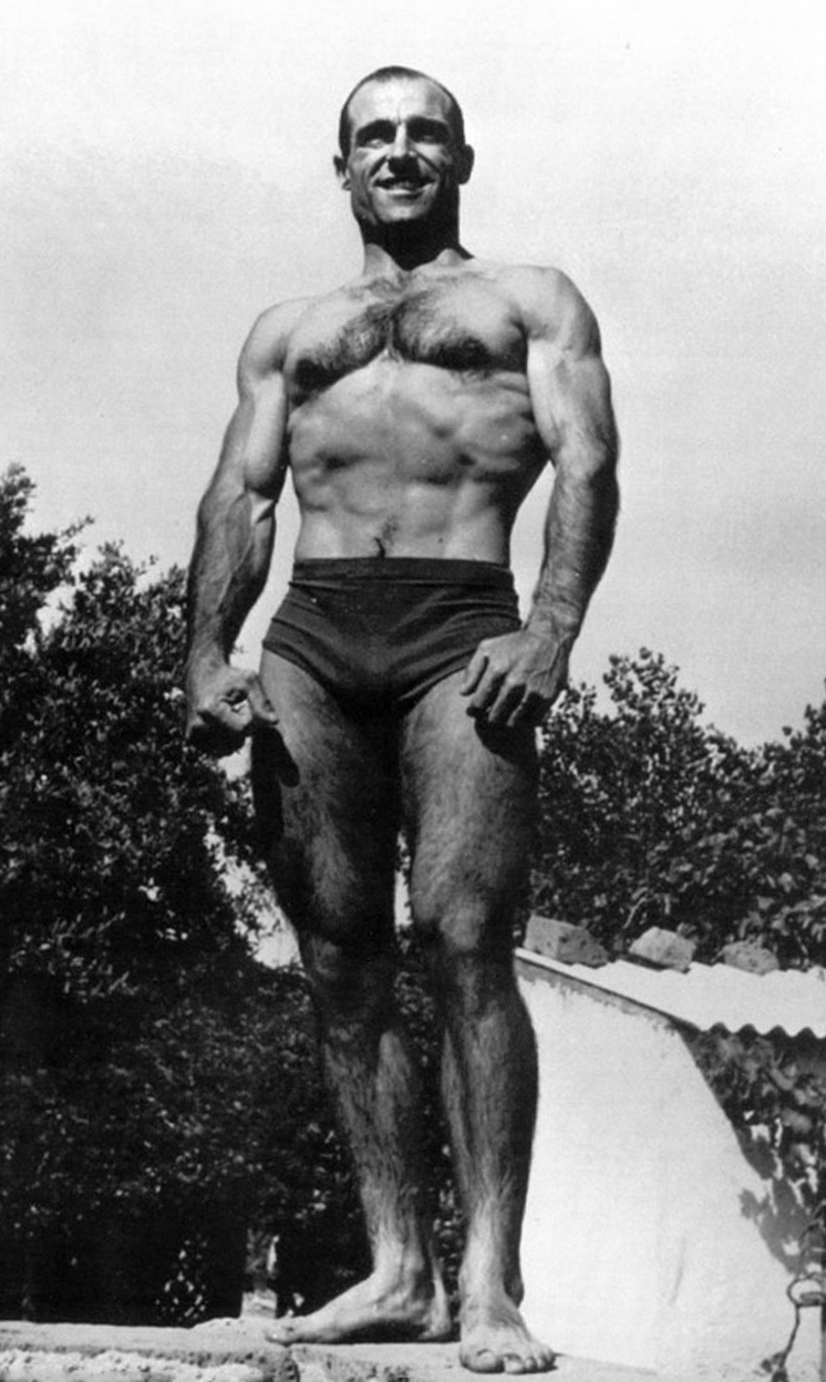 Sebastiano Mannironi